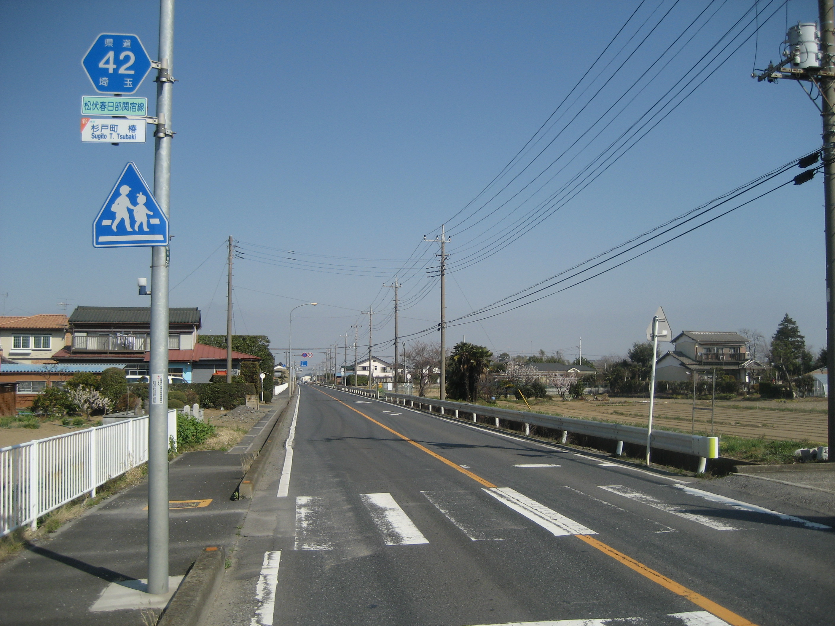 埼玉県道42号線杉戸町椿付近